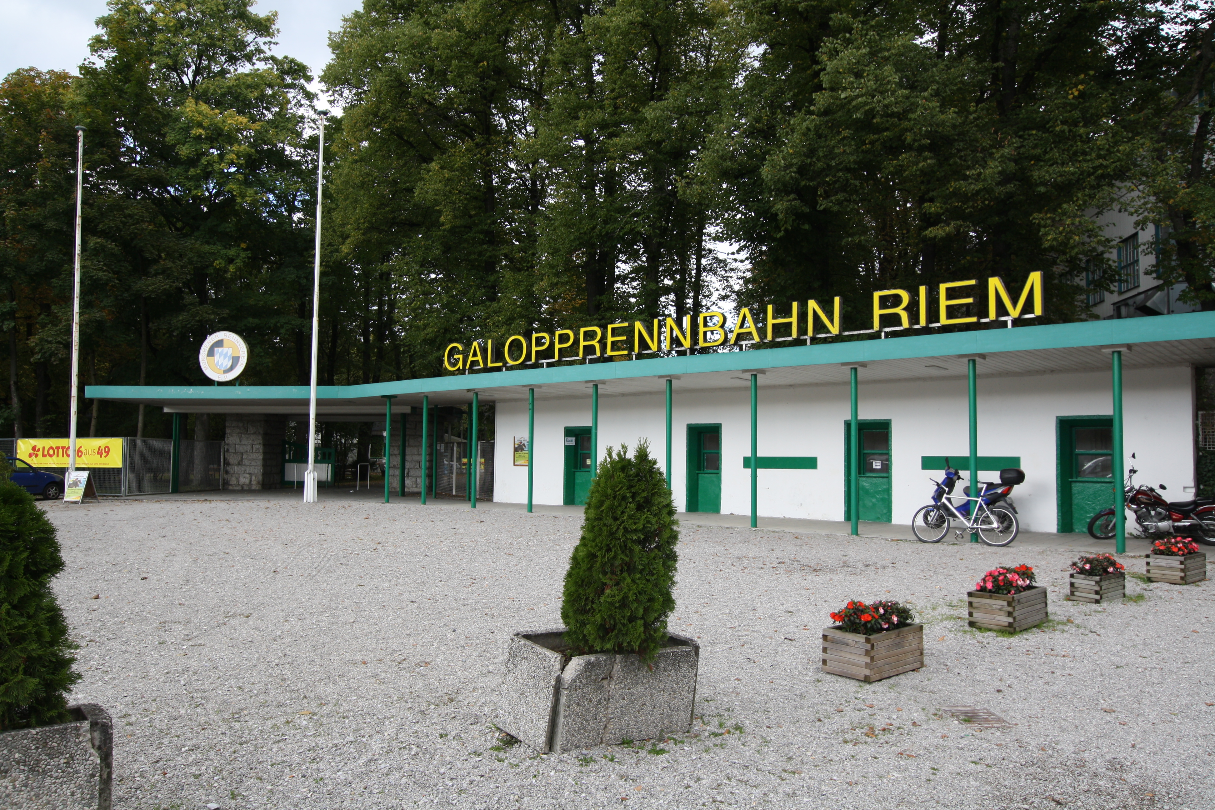 Eingang der Galopprennbahn Riem